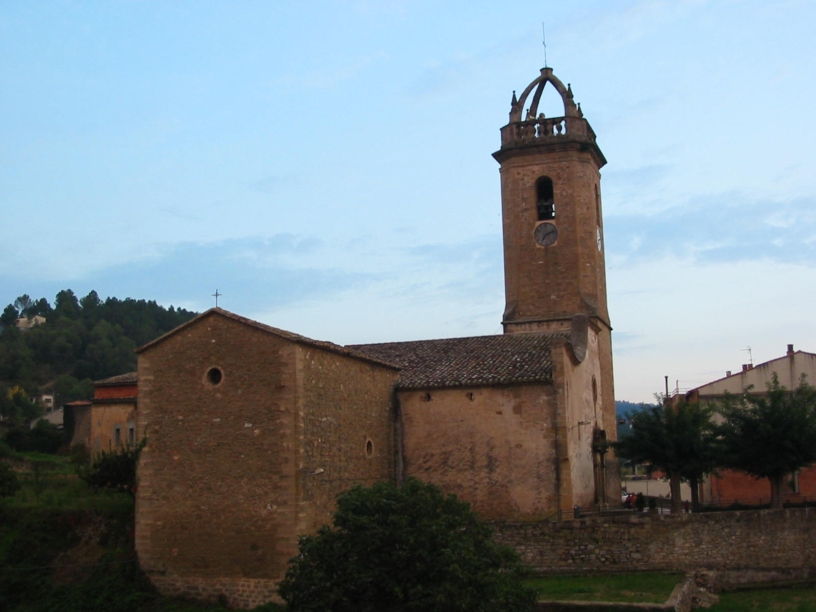 Iglesia de Sant Feliu en Monistrol de Calders